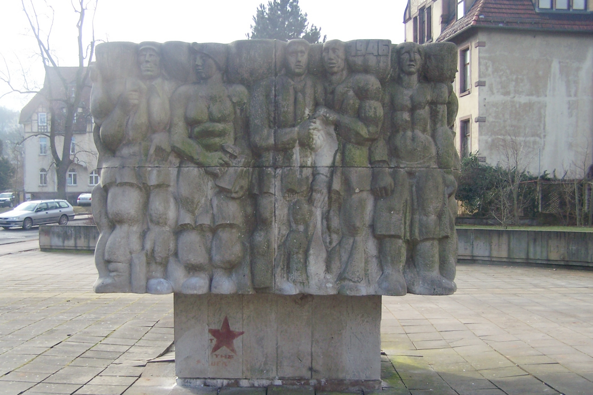 Das nördliche Bildmotiv stellt den beginnenden Wiederaufbau Deutschlands nach dem Zweiten Weltkrieg dar, hierfür steht das Jahr 1946.